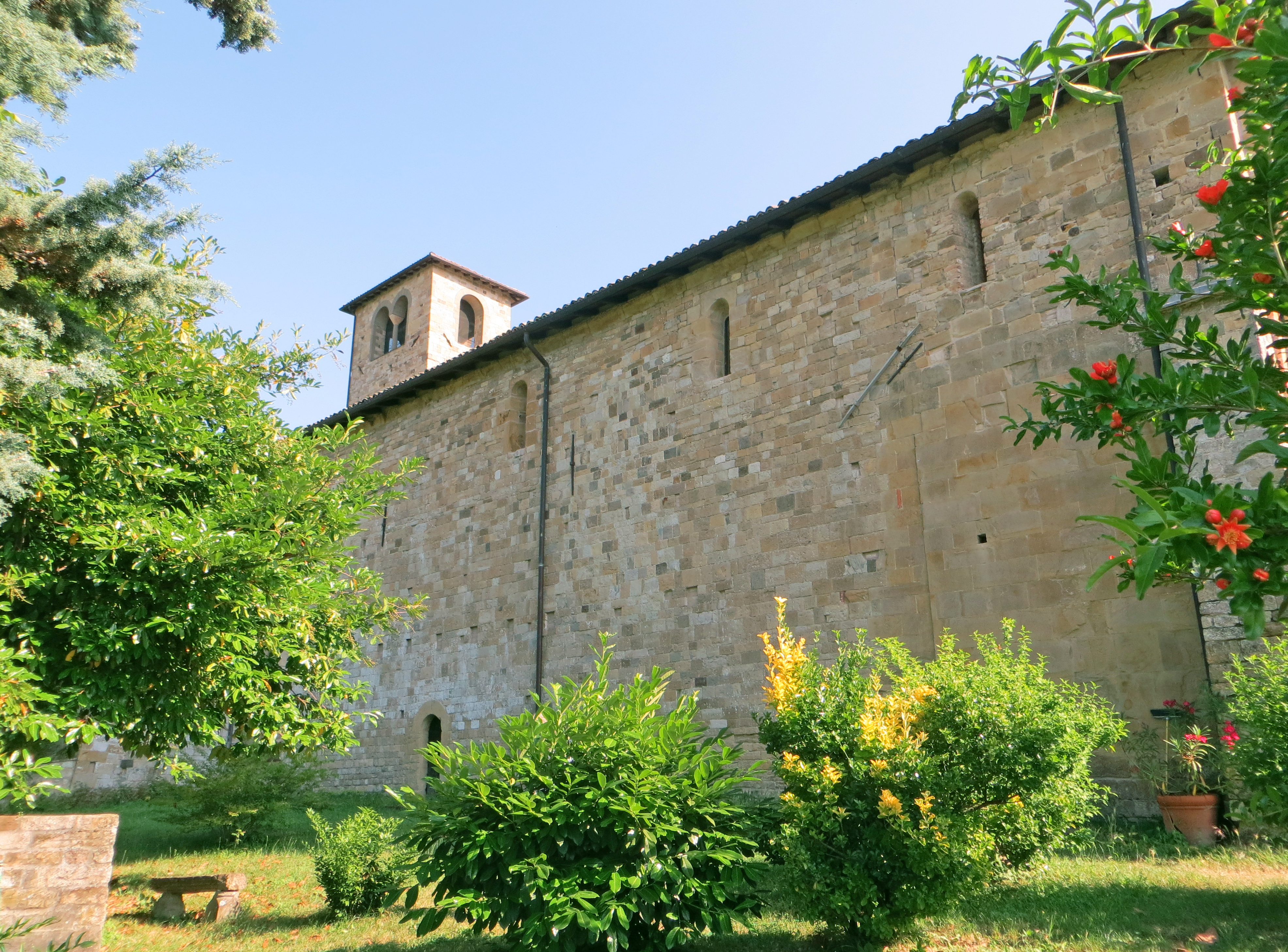 Abbazia di San Basilide (San Michele Cavana, Lesignano de' Bagni) - lato nord della chiesa dei Santi Pietro e Paolo This is a photo of a monument which is part of cultural heritage of Italy.